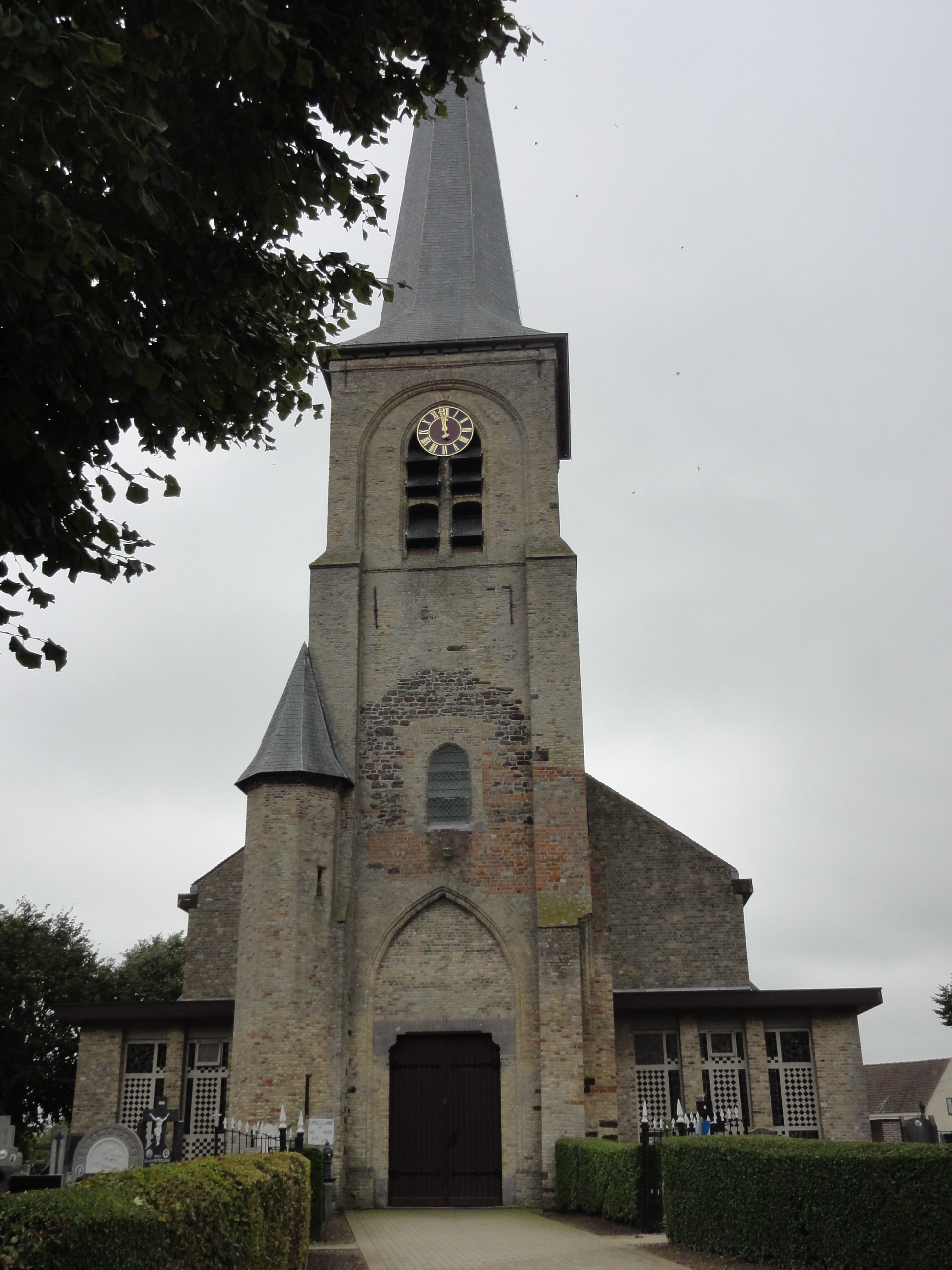 Parochiekerk Sint-Lambertus, Hoogstade, Alveringem